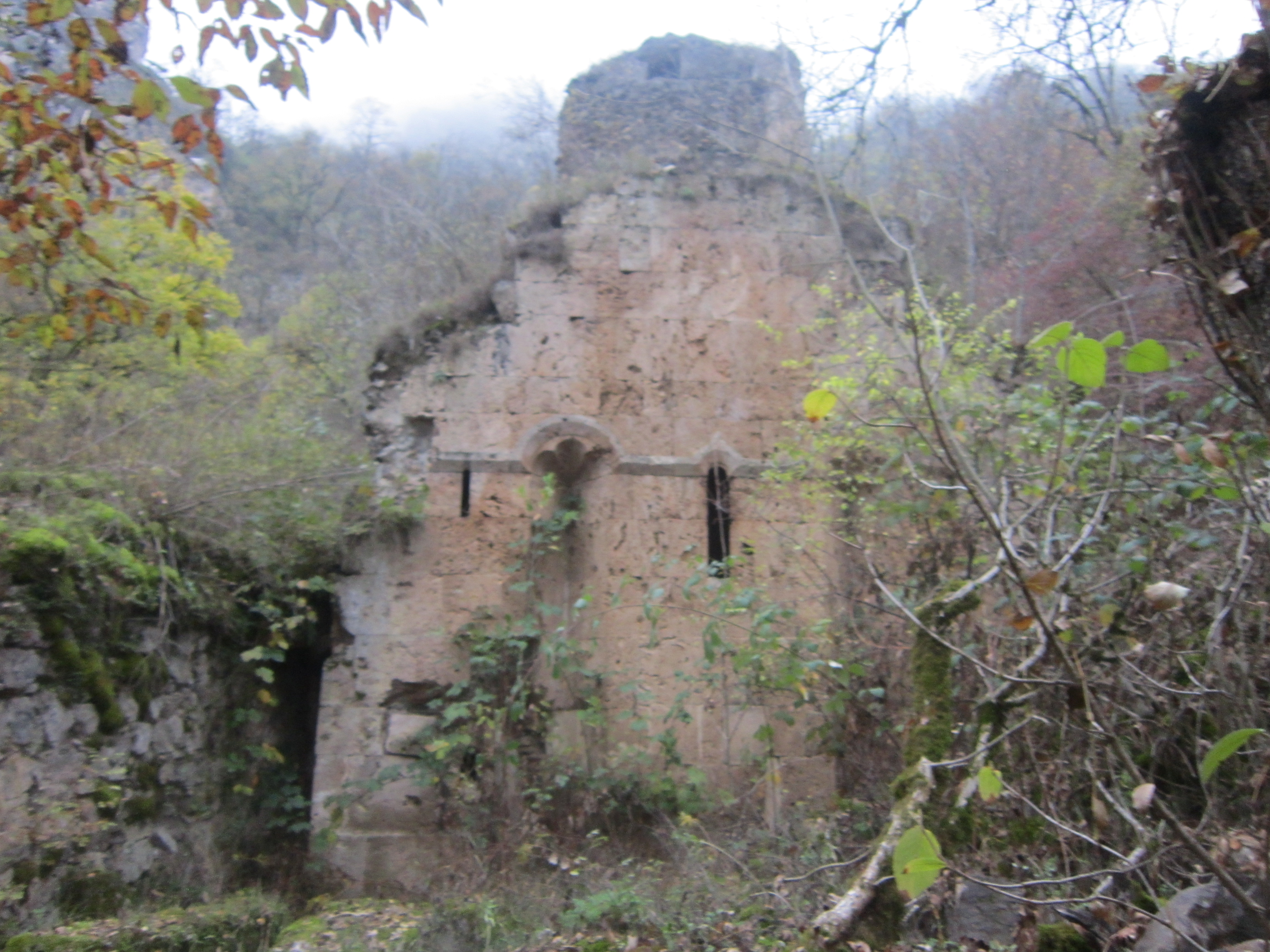 Վանական համալիր Շխմուրադ 38/16